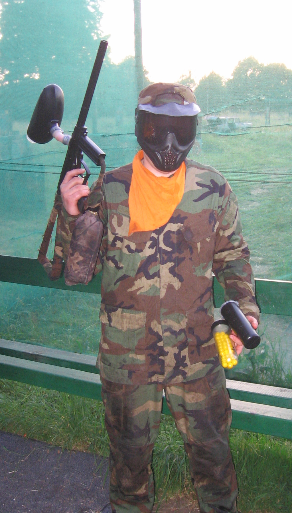 Gracz w kombinezonie, z bronią. W ręce trzyma zapasowy pojemnik z kulkami z farbą.